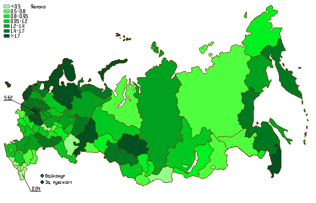 Результаты политической партии "Яблоко" на парламентских выборах 2007 года (по регионам)